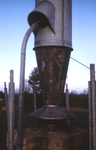 Matning för antingen mellanvåg eller FM/TV vid en av masterna vid Östersunds Radiostation kort före rivnig.